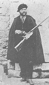 Il brigante Vito di Gianni, alias "Totaro", immagine resa in bianco e nero